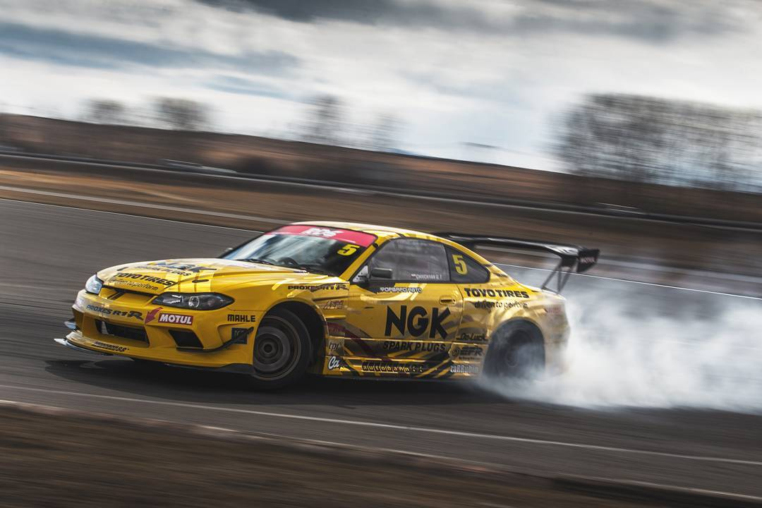 Сильвия Георгия Чивчяна